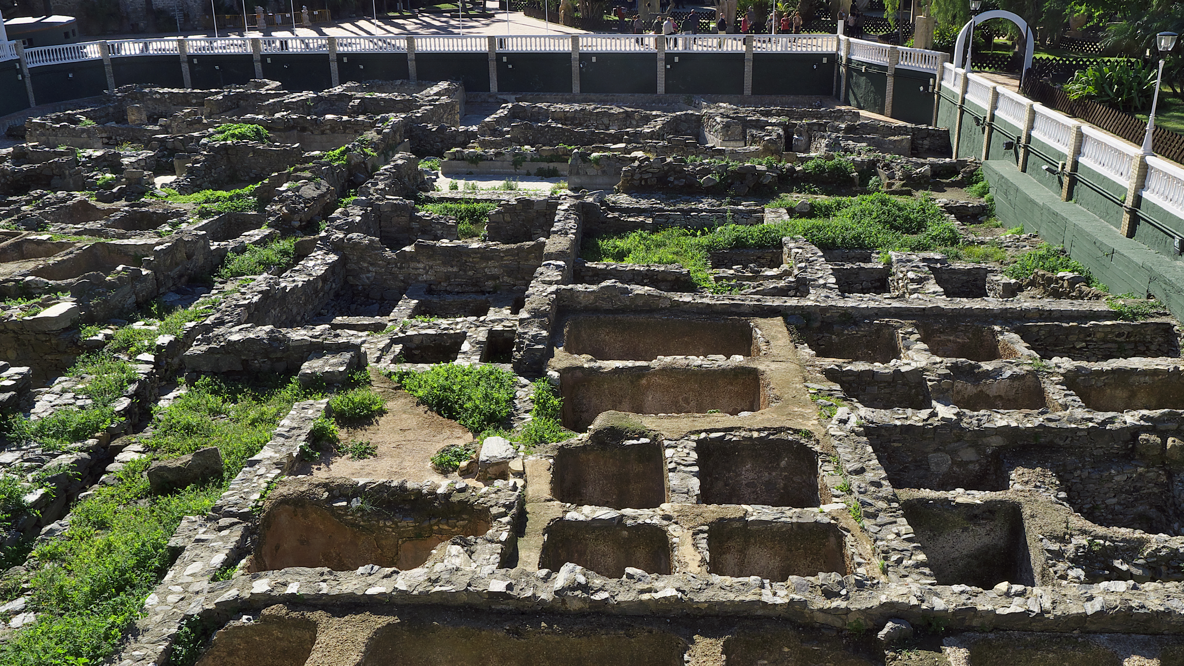 Fábrica de salazón de pesado y garum de Hispania en los siglos I y II d.C. (el Majuelo, Sexi, Almuñécar).